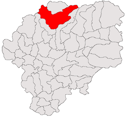 Categorie:Hărţi ale judeţului Bistriţa-Năsăud